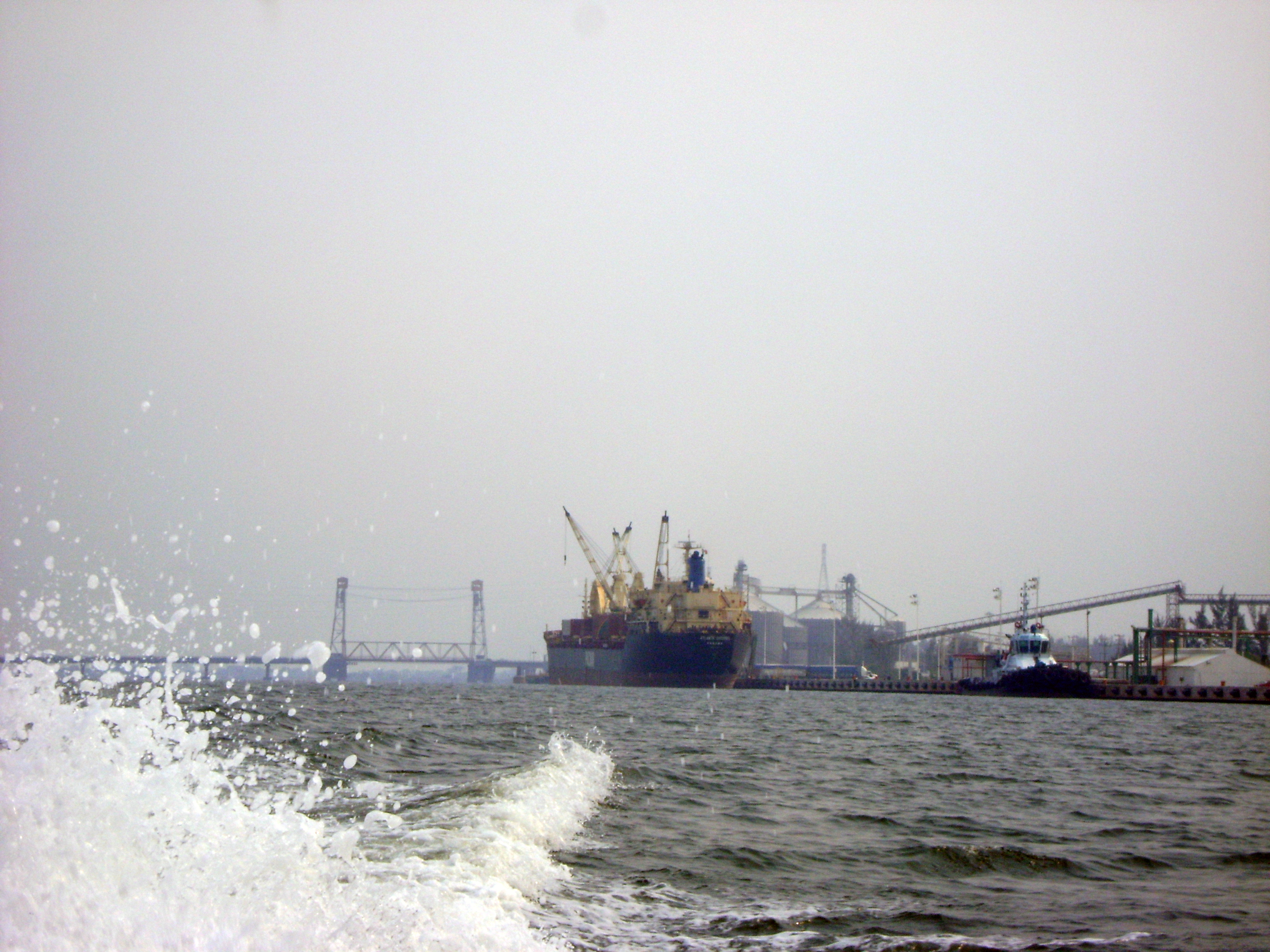 Imagen del Río Coatzacoalcos, lugar donde se esconde la serpiente. Orgullo del Sur de Veracruz.